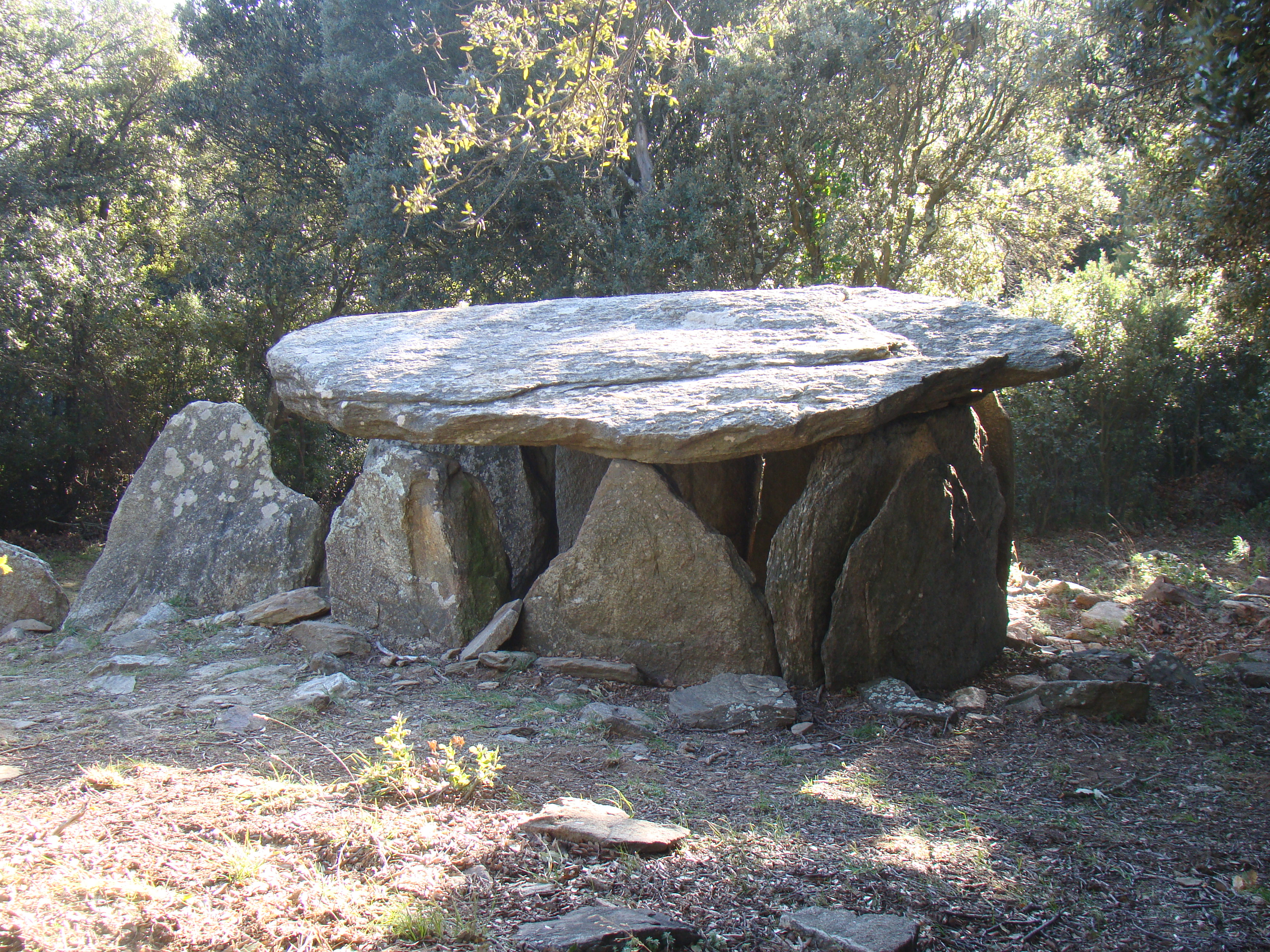 Dolmen de Balma de Na Cristiana vu de derrière sur la droite